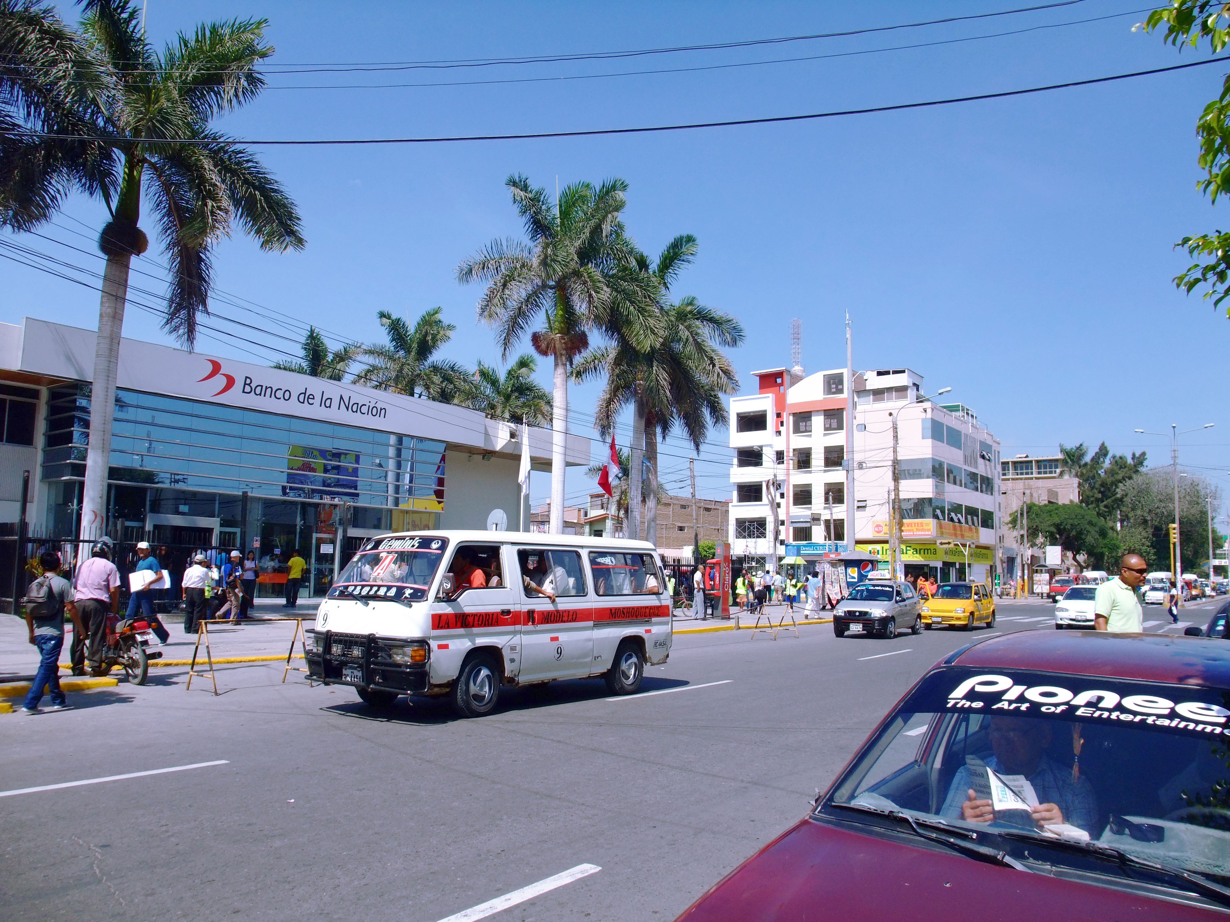 Chiclayo, Perú